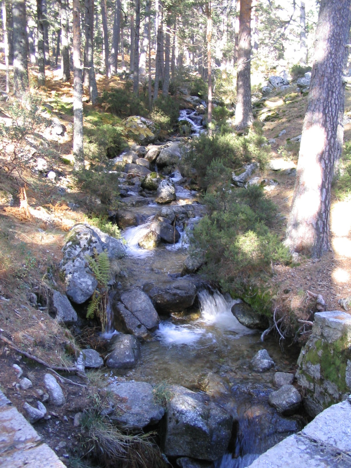 Río Samburiel en el Valle de la Barranca (Comunidad de Madrid, España).